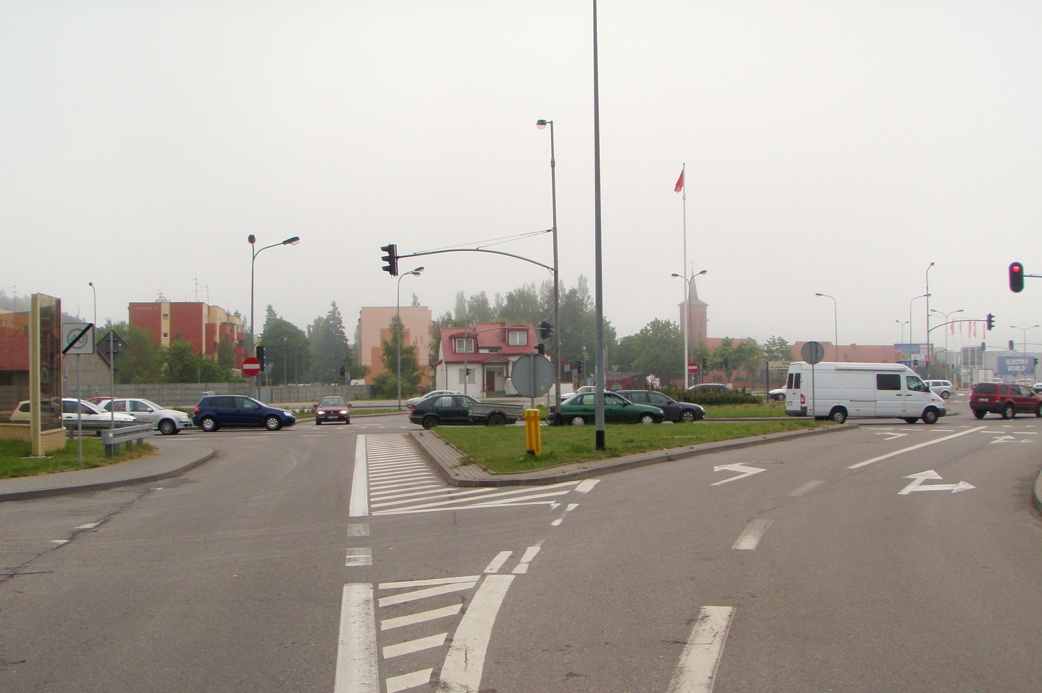 Gdańsk, rondo im. Jacka Kaczmarskiego.